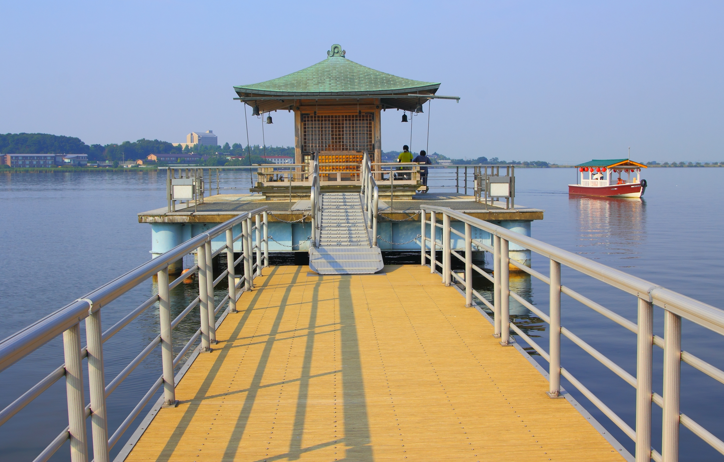 片山津温泉、柴山潟にある浮御堂(石川県加賀市)